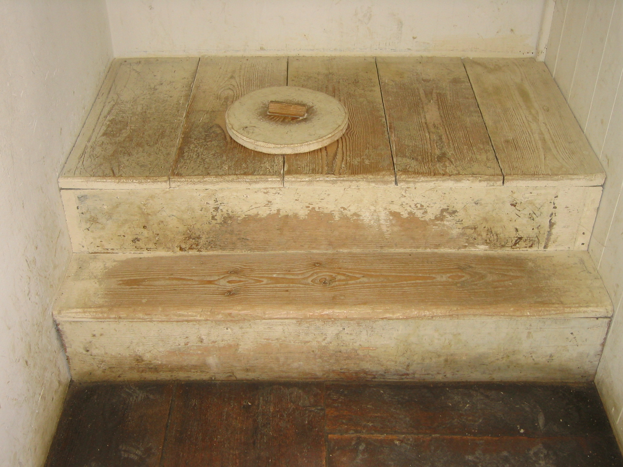 Plumpsklo im Freilichtmuseum Neuhausen ob Eck